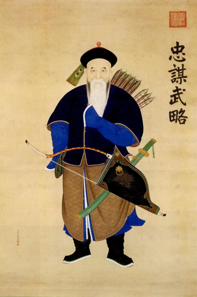 Yang Yuchun 楊遇春，平定回疆𠞰捦逆裔四十四功臣像。